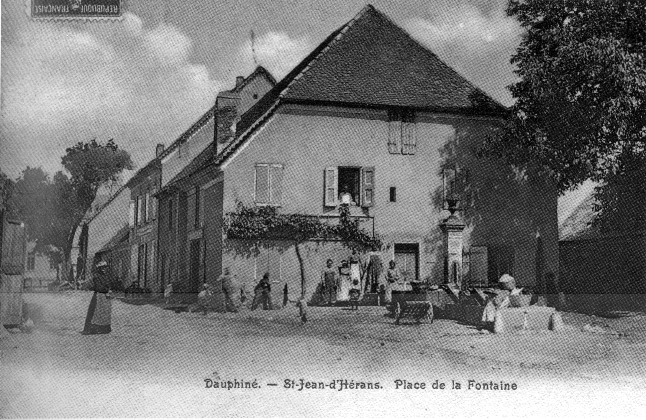 Saint-Jean-d'Hérans, place de la fontaine, 1905